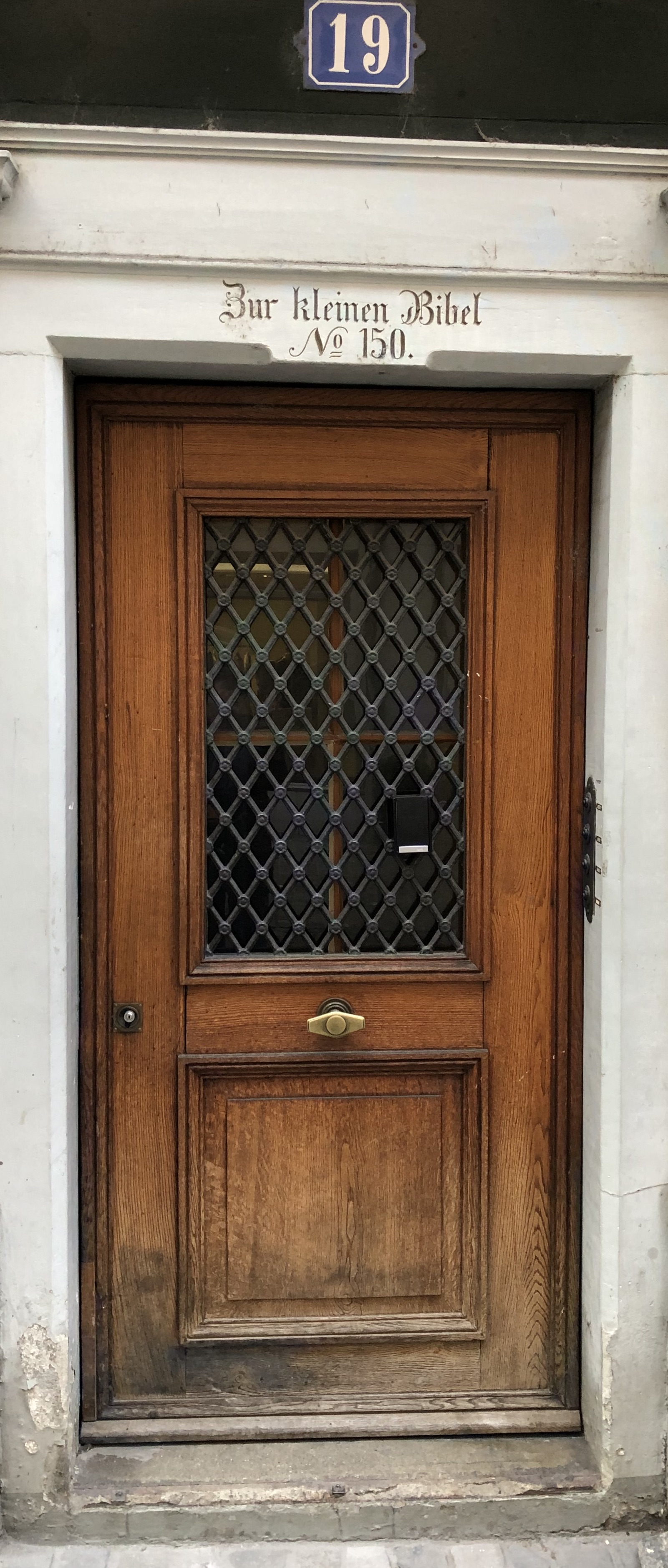 Storchengasse 19: Barbara Schaufelbergers Bibeldruckerei